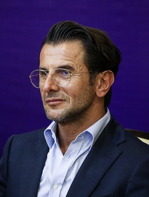 امین حیایی در نشست خبری عصر جدید